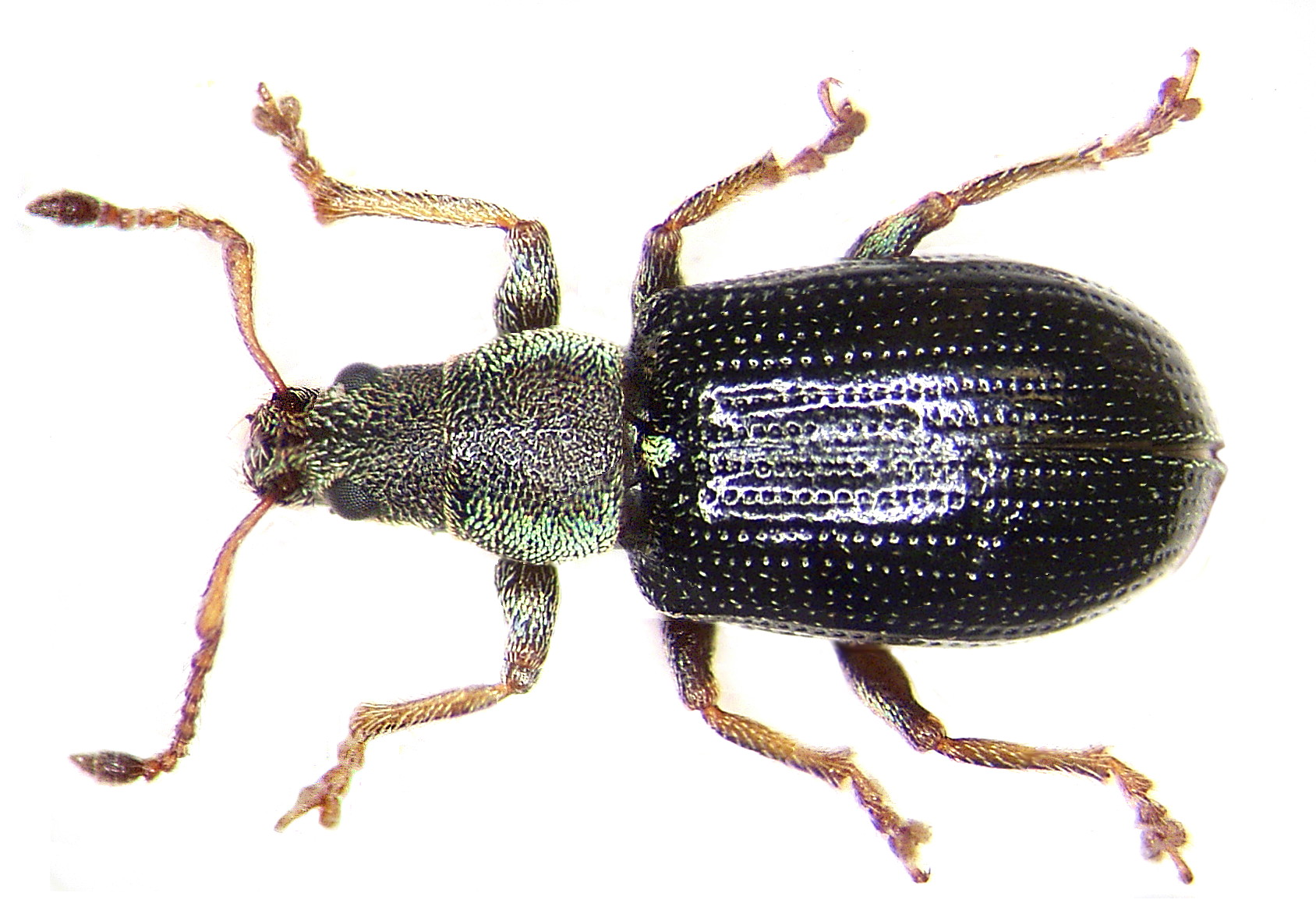 Familie: Curculionidae Groesse: 3-5 mm Verbreitung: Europa Ökologie: polyphag auf Pflanzen Fundort: Germania, Bayern, Oberfranken, Selbitz leg. det. U.Schmidt, 1972 Photo: U.Schmidt, 2006